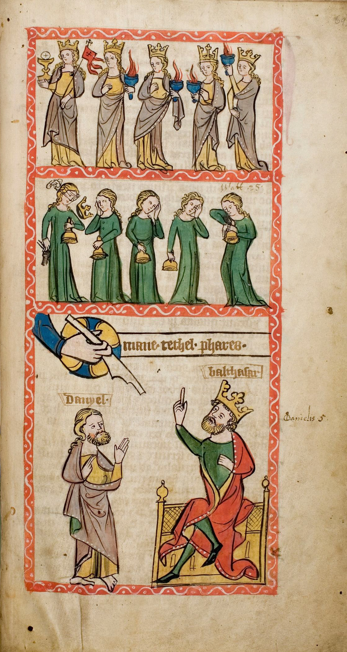 Speculum Humanae Salvationis, Westfalen oder Köln, um 1360. ULB Darmstadt, Hs 2505, fol. 69r